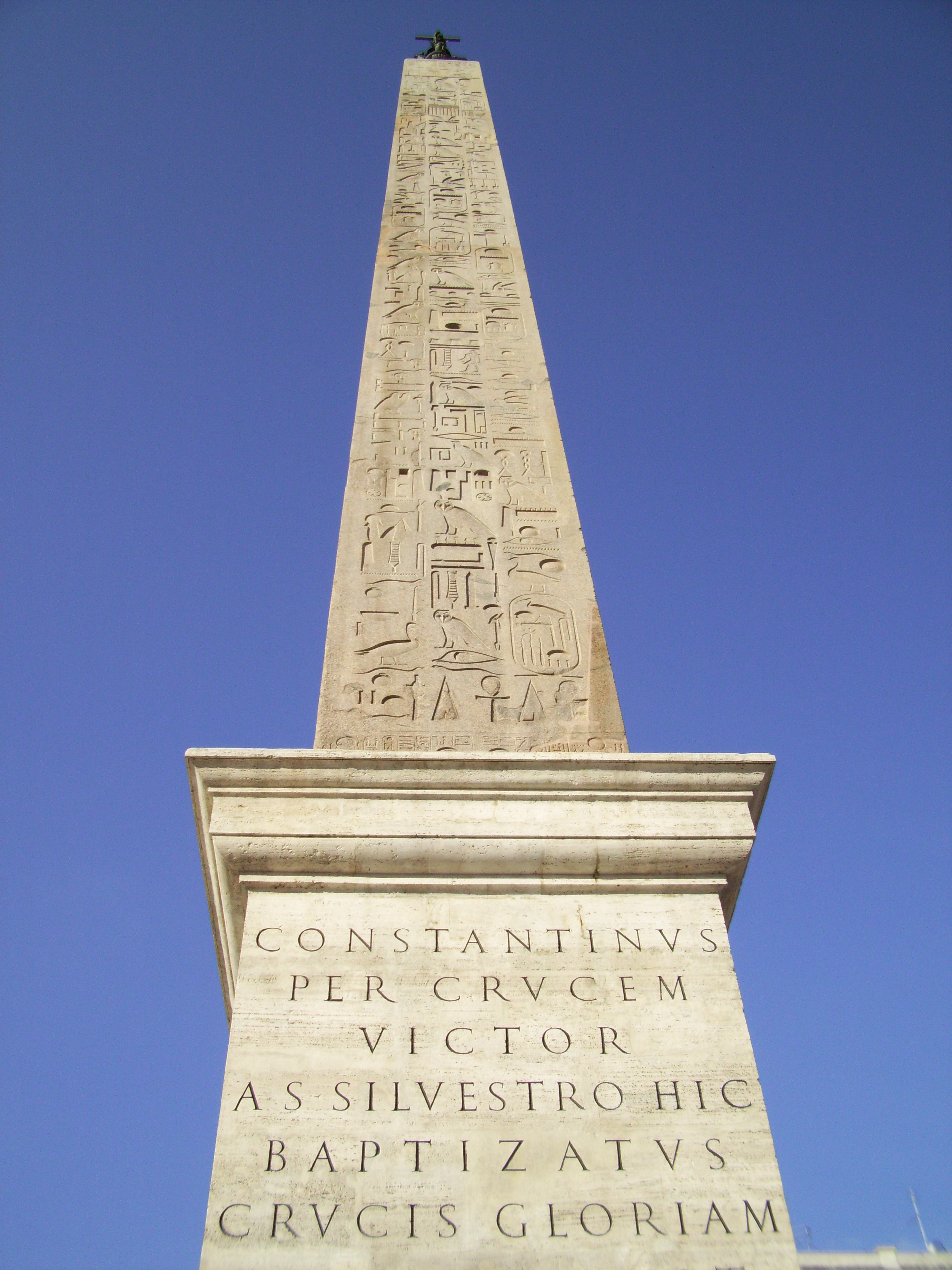 L'obelisco lateranense dopo i restauri conclusi nel 2008- Piazza San Giovanni, Roma.